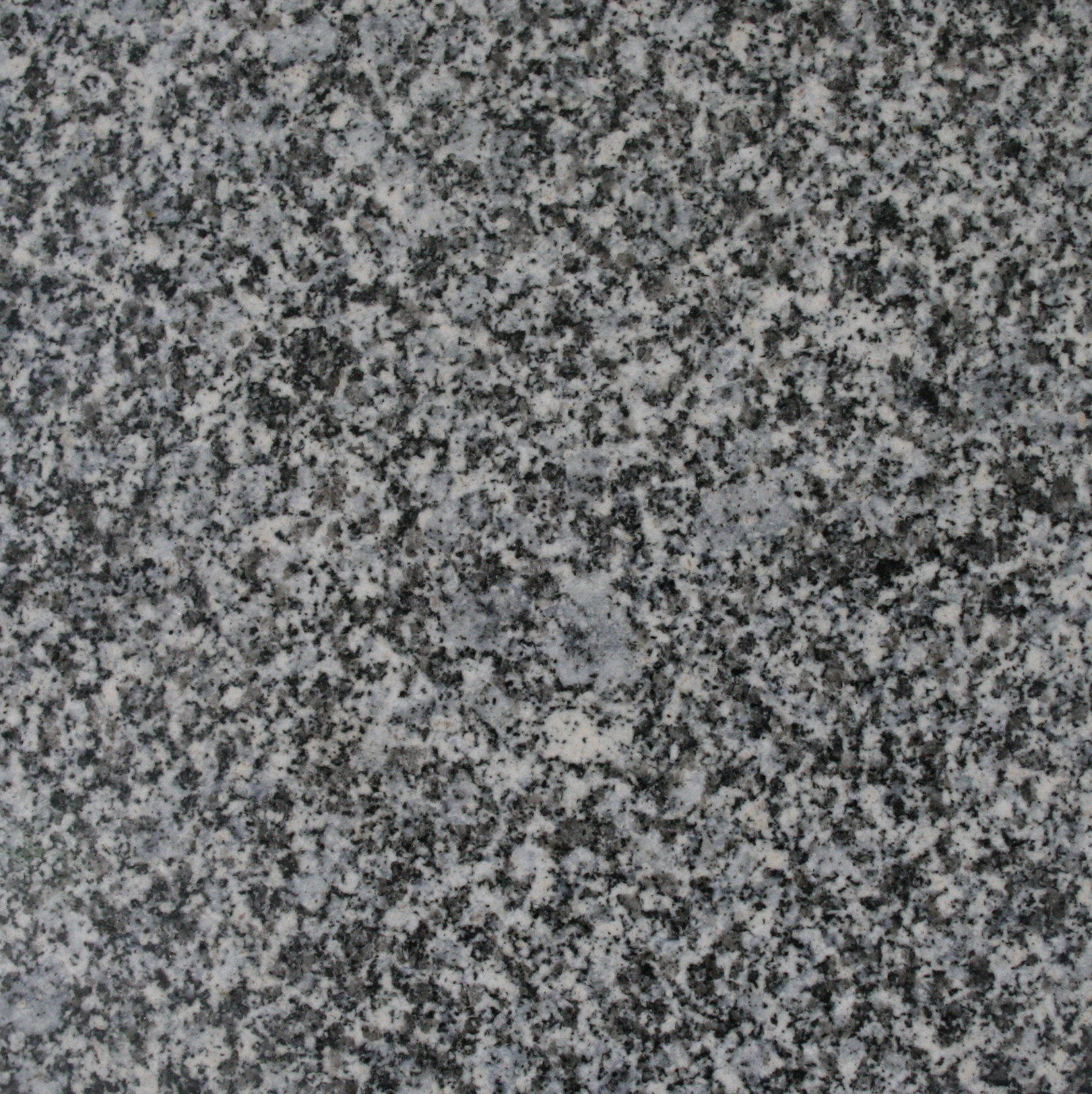 Muster eines Hauzenberger Granit, Oberfläche poliert, ca. 12 x 12 cm groß